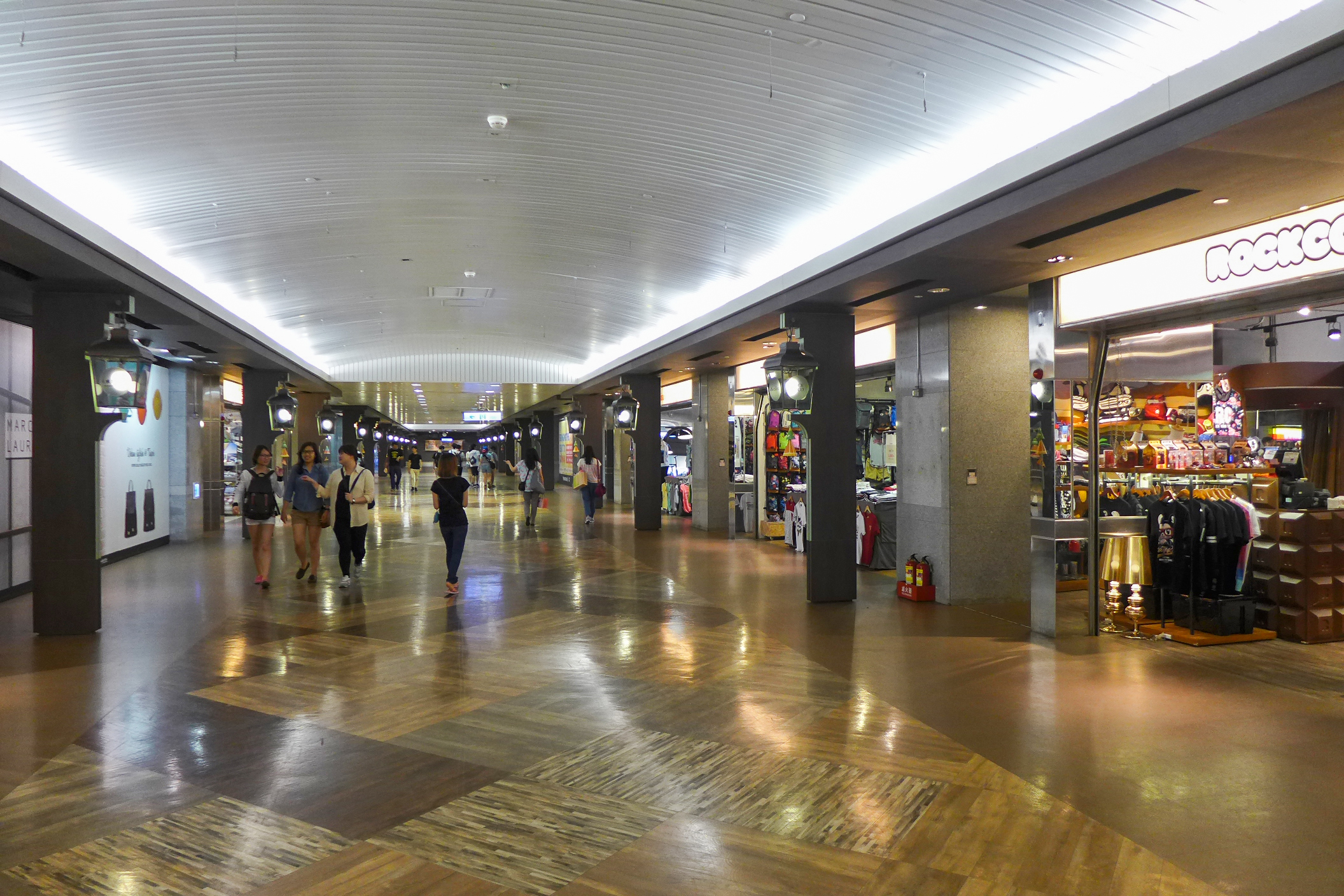 Eslite Taipei Station